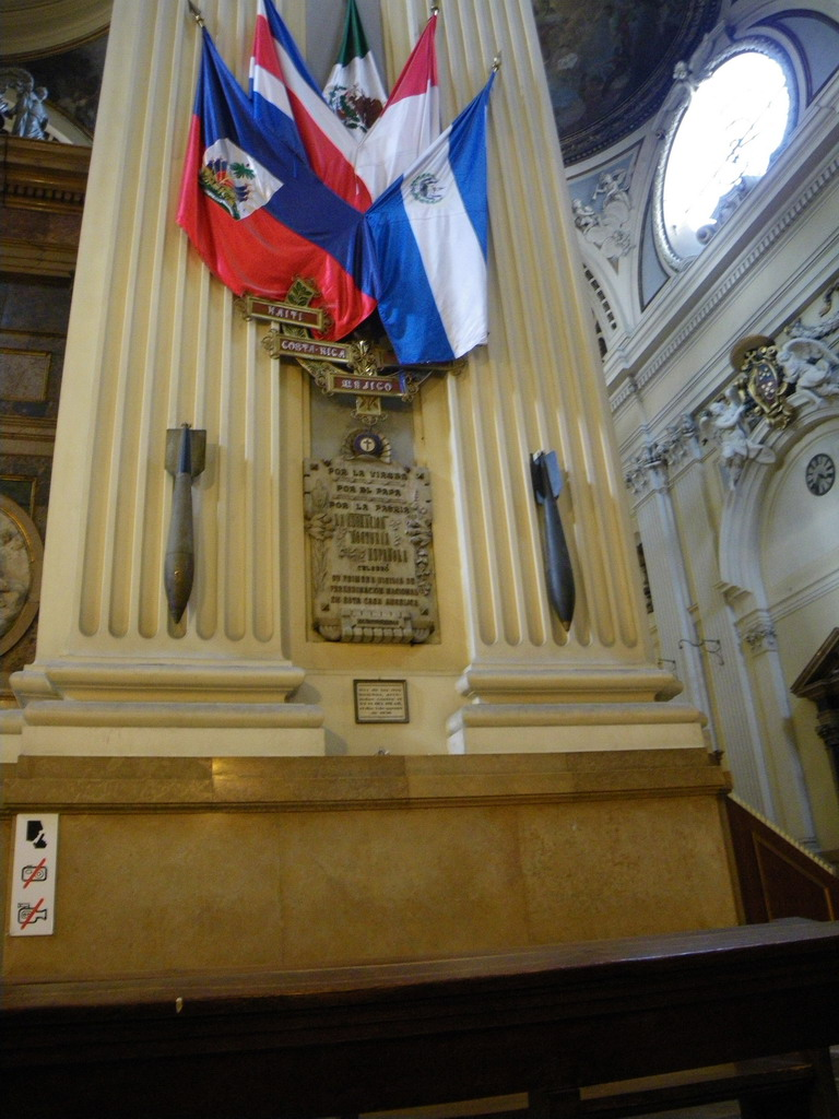 Fliegerbomben in Basilica del Pilar, Spanien, Zaragoza.